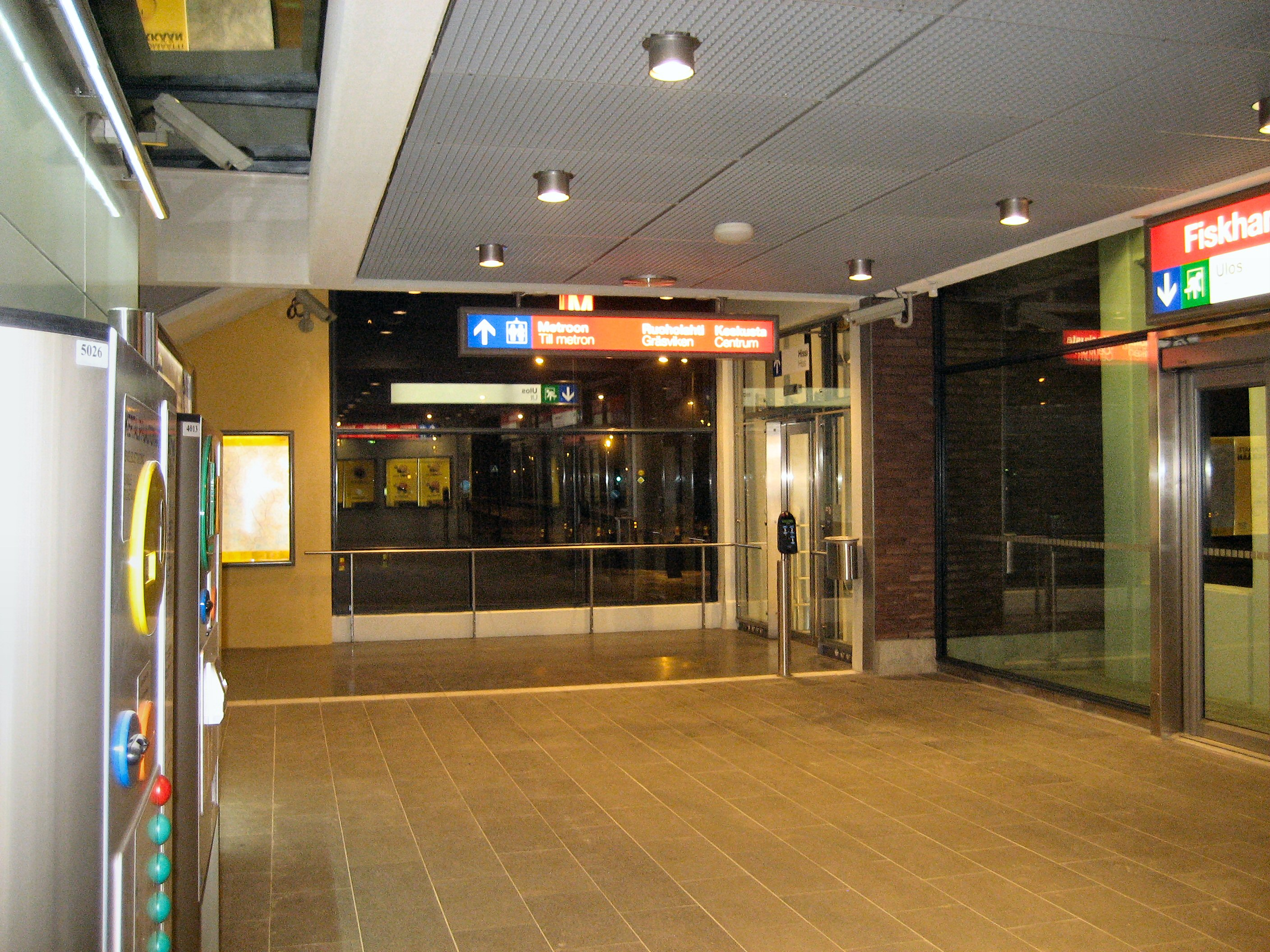 Kalasatama metro station entrance